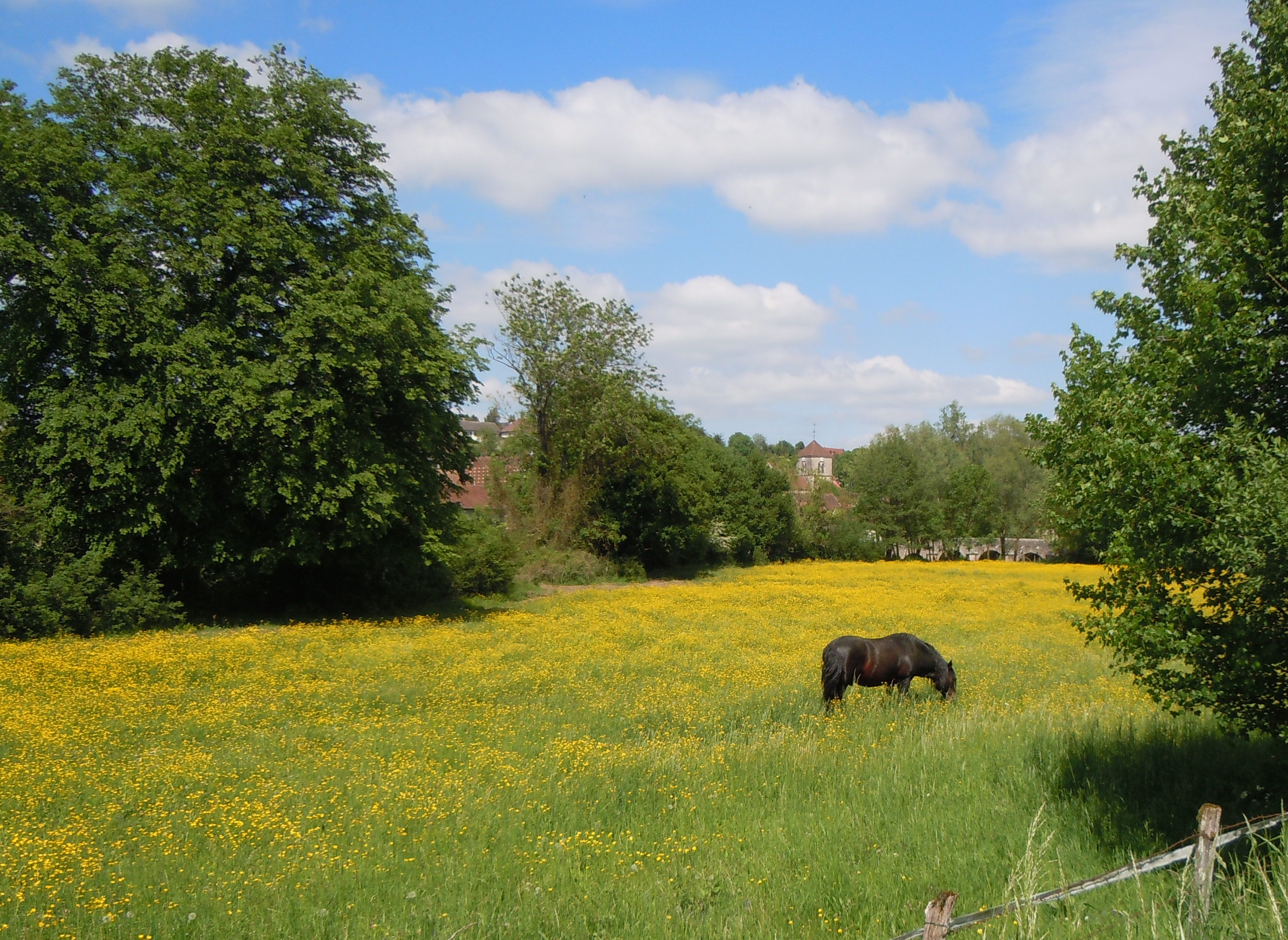 Prairie en mai à Fleurey-sur-Ouche, entre l'Ouche et le Canal de Bourgogne